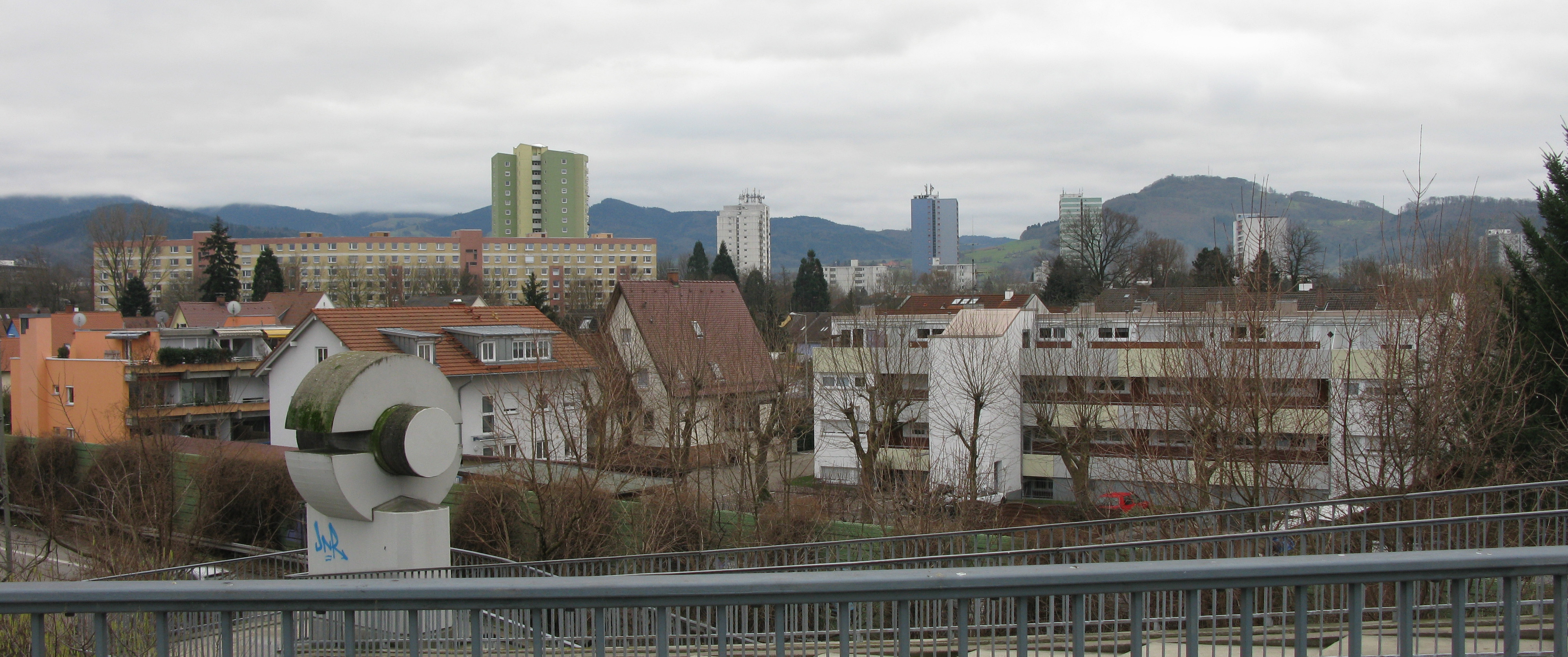 Blick auf Weingarten von der Berliner Brücke